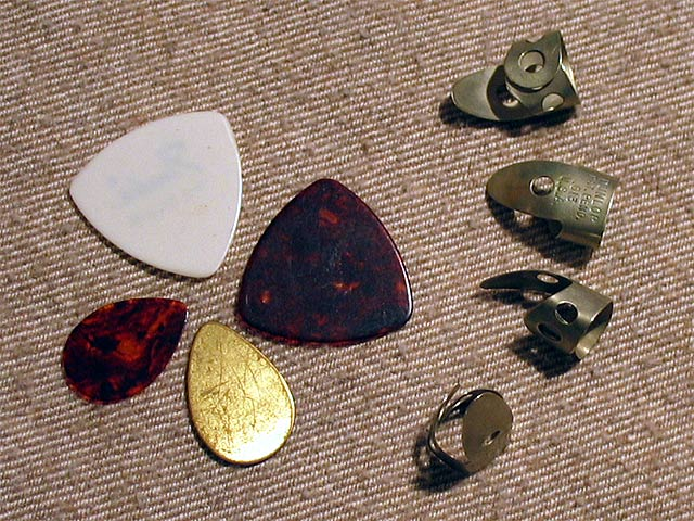 Plektrum: vier flache (links) und vier zum Aufziehen auf die Finger